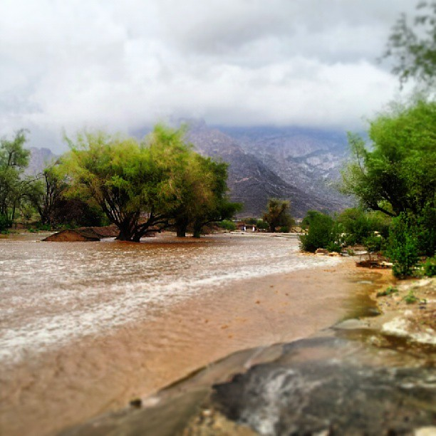 وادي الخانق بارق